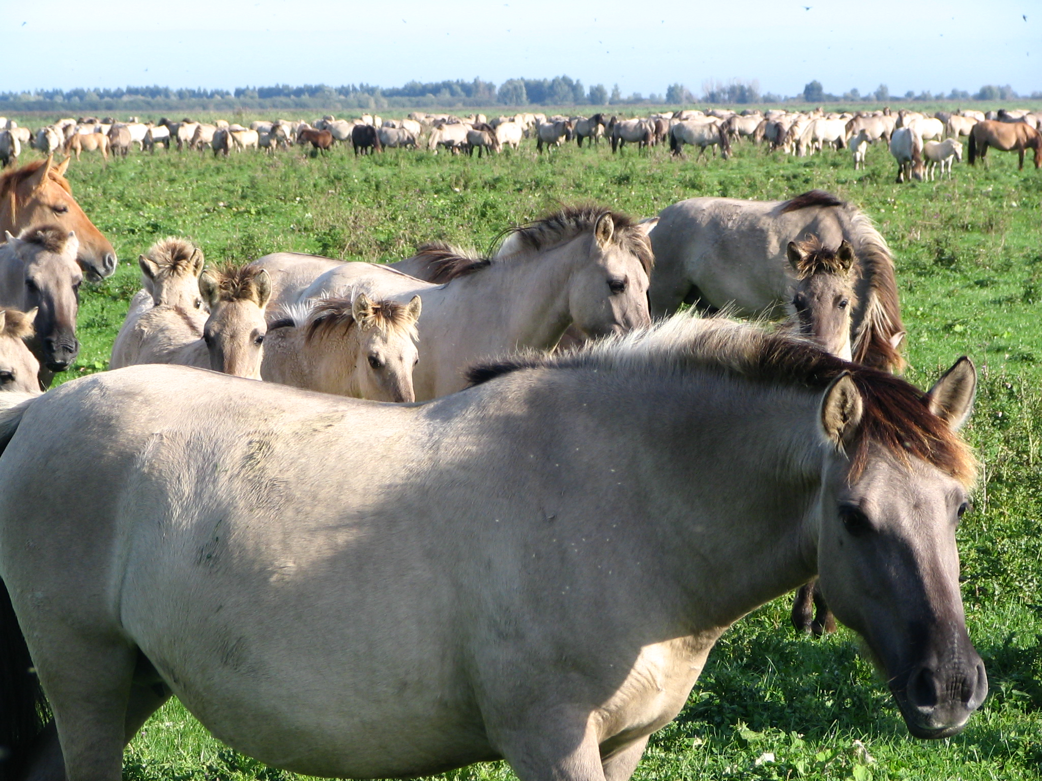 Eigen opname. GerardM